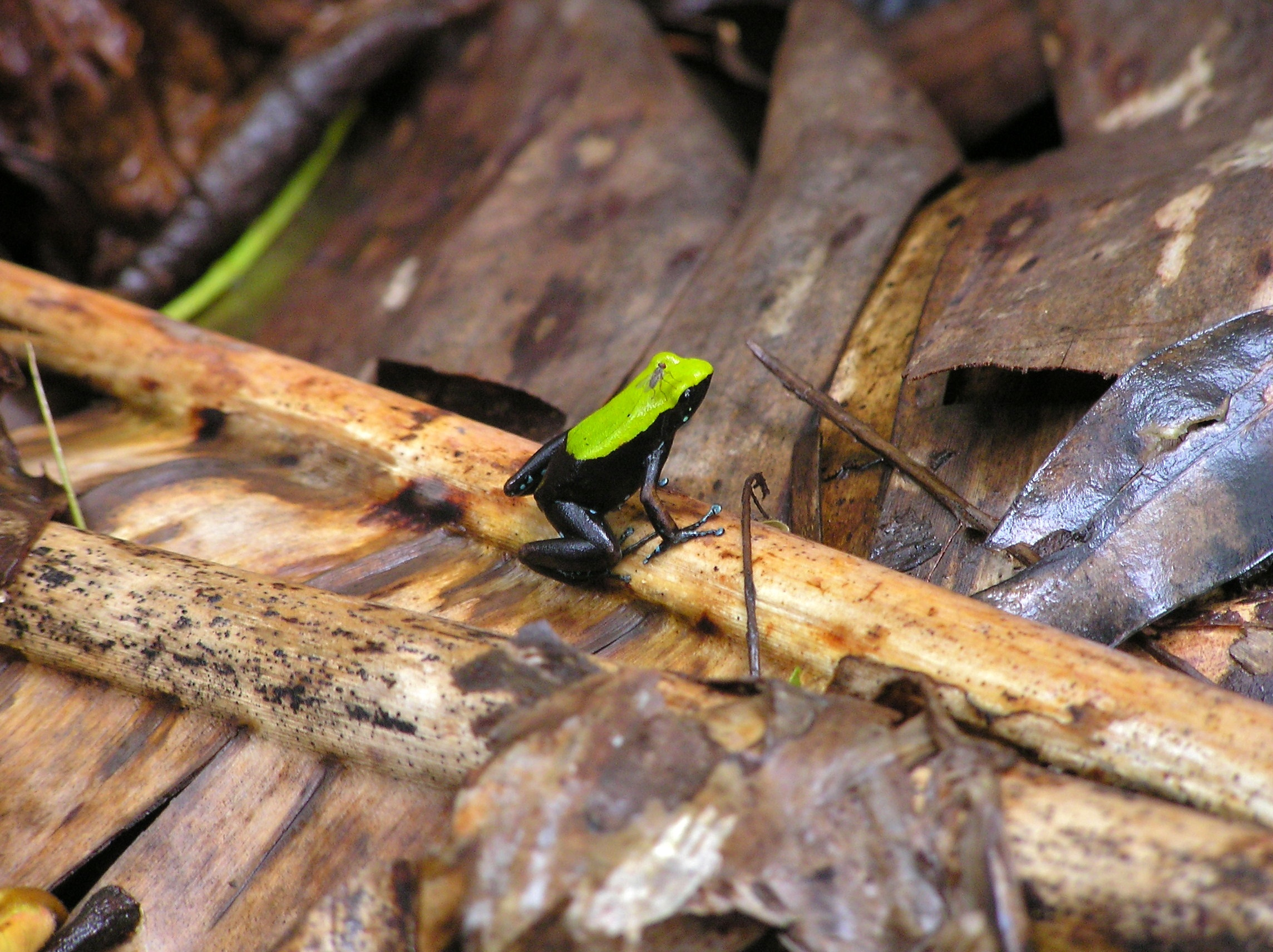 Nosy Mangabe, MADAGASCAR